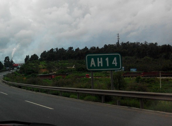 亚洲公路14号线与中国国家高速G56并行路段，云南昆明附近路牌。